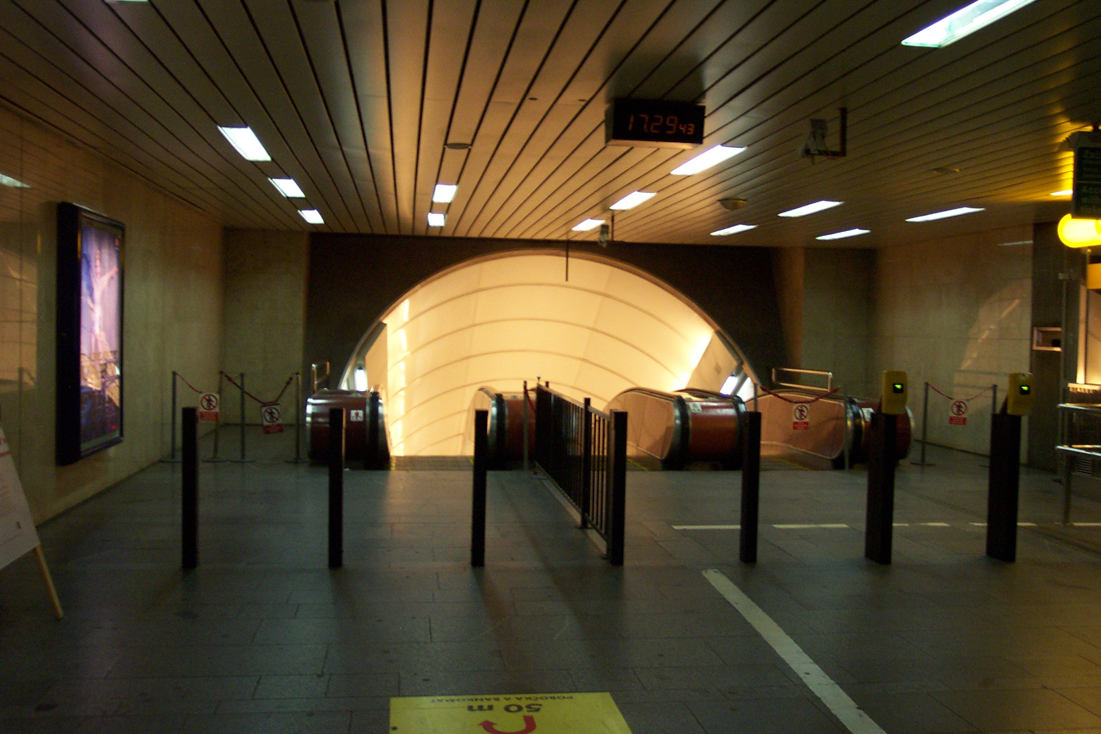 Stanice metra Karlovo náměstí - Metro station Karlovo náměstí